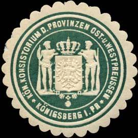 Siegelmarke des Konsistoriums für die Provinzen Ostpreußen und Westpreußen in Königsberg.